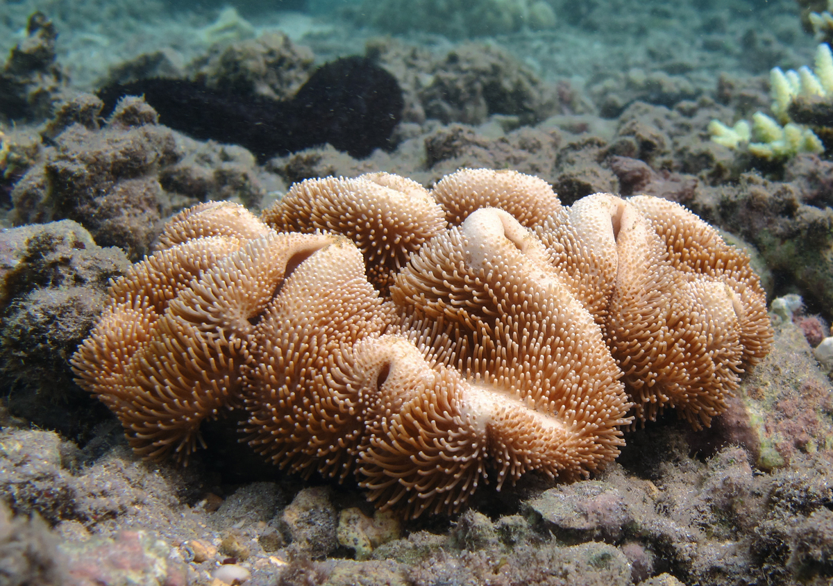 Corail-cuir Sarcophyton trocheliophorum à la Réunion.